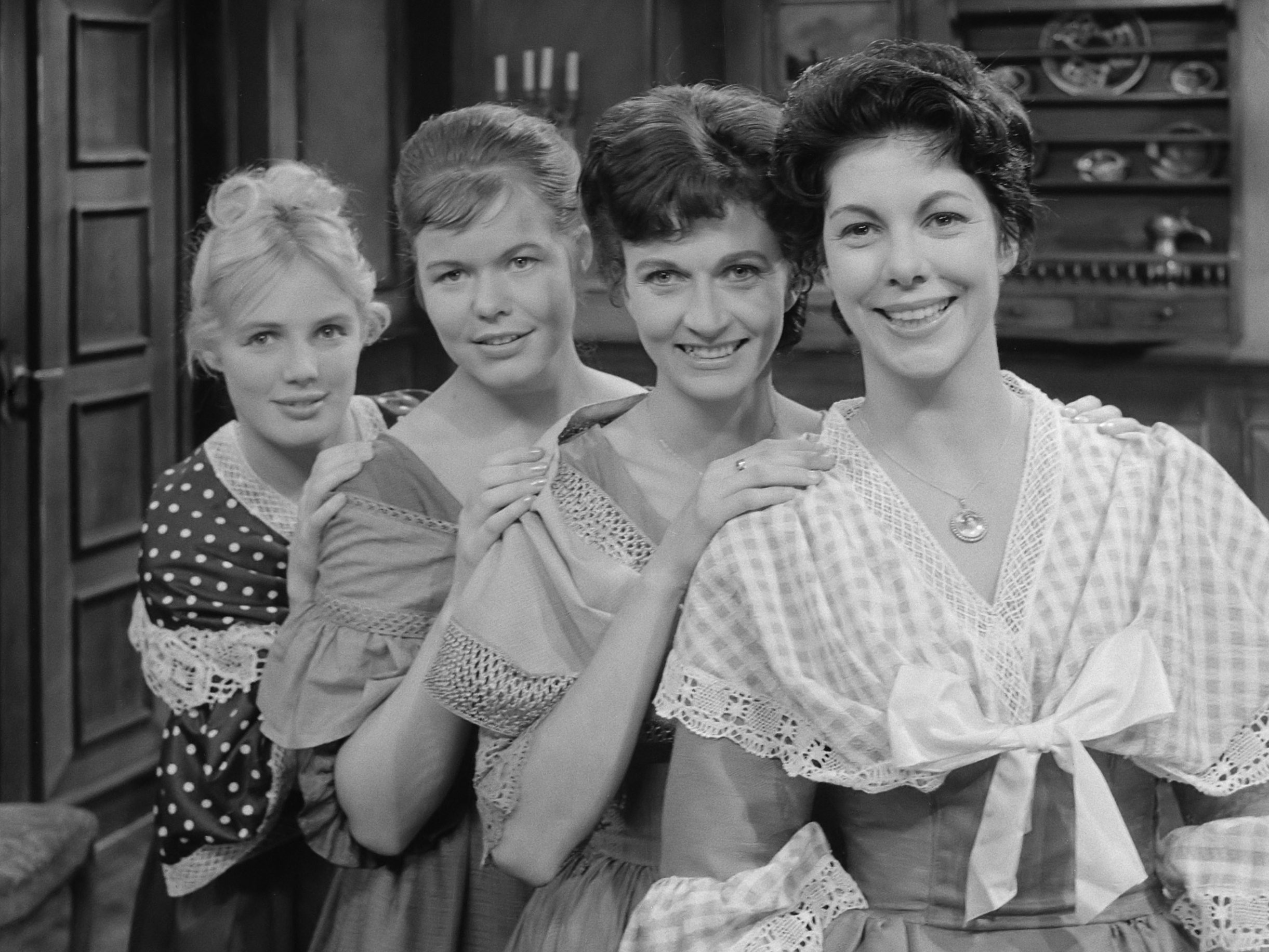 Televisiespel "De Zusters Bennett". vlrn. Liselot Beekmeyer, Marja Habraken, Lies Franken, Ann Hasekamp 5 november 1961